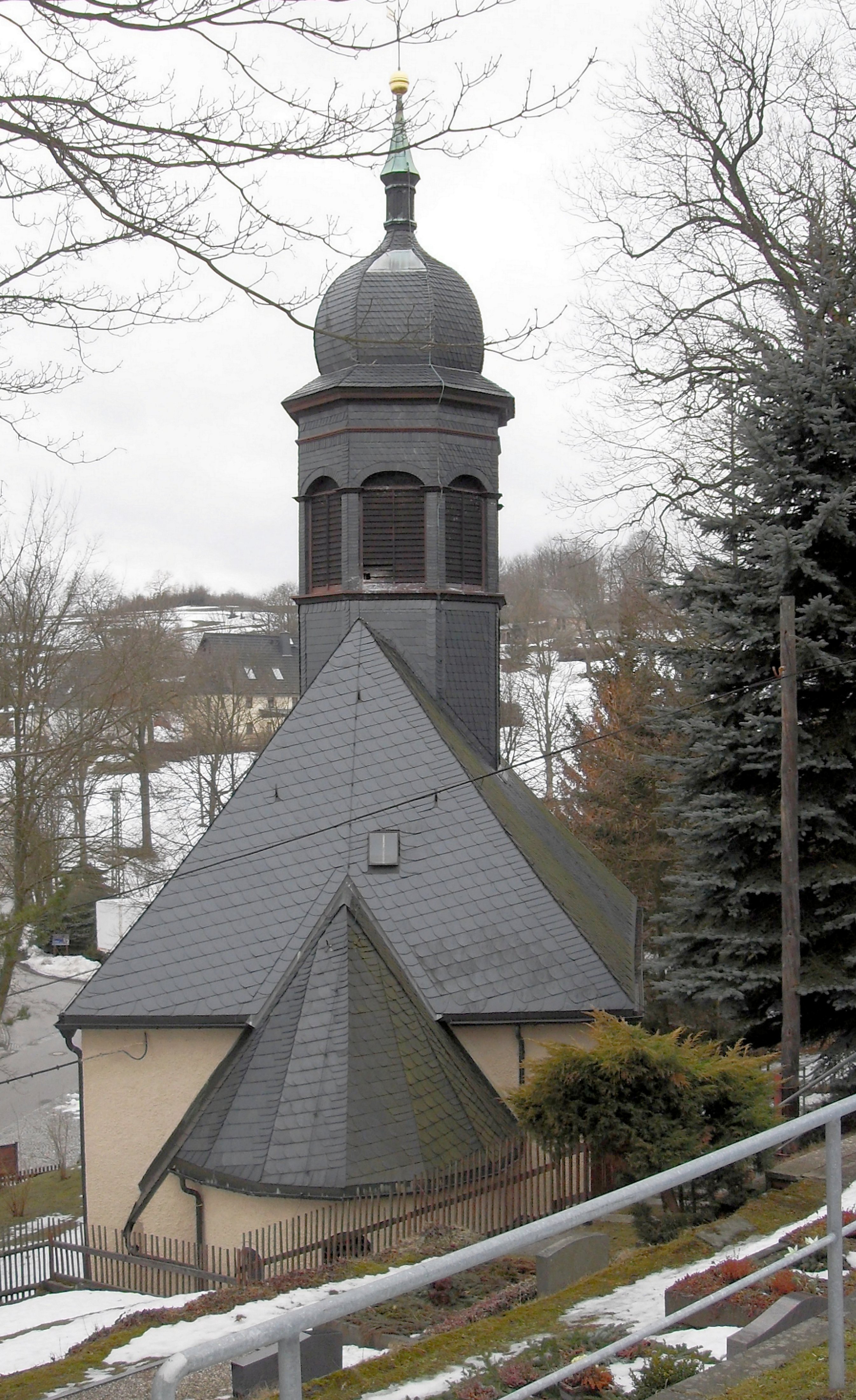 Pfarrkirche Heidersdorf, Erzgebirgskreis, Deutschland